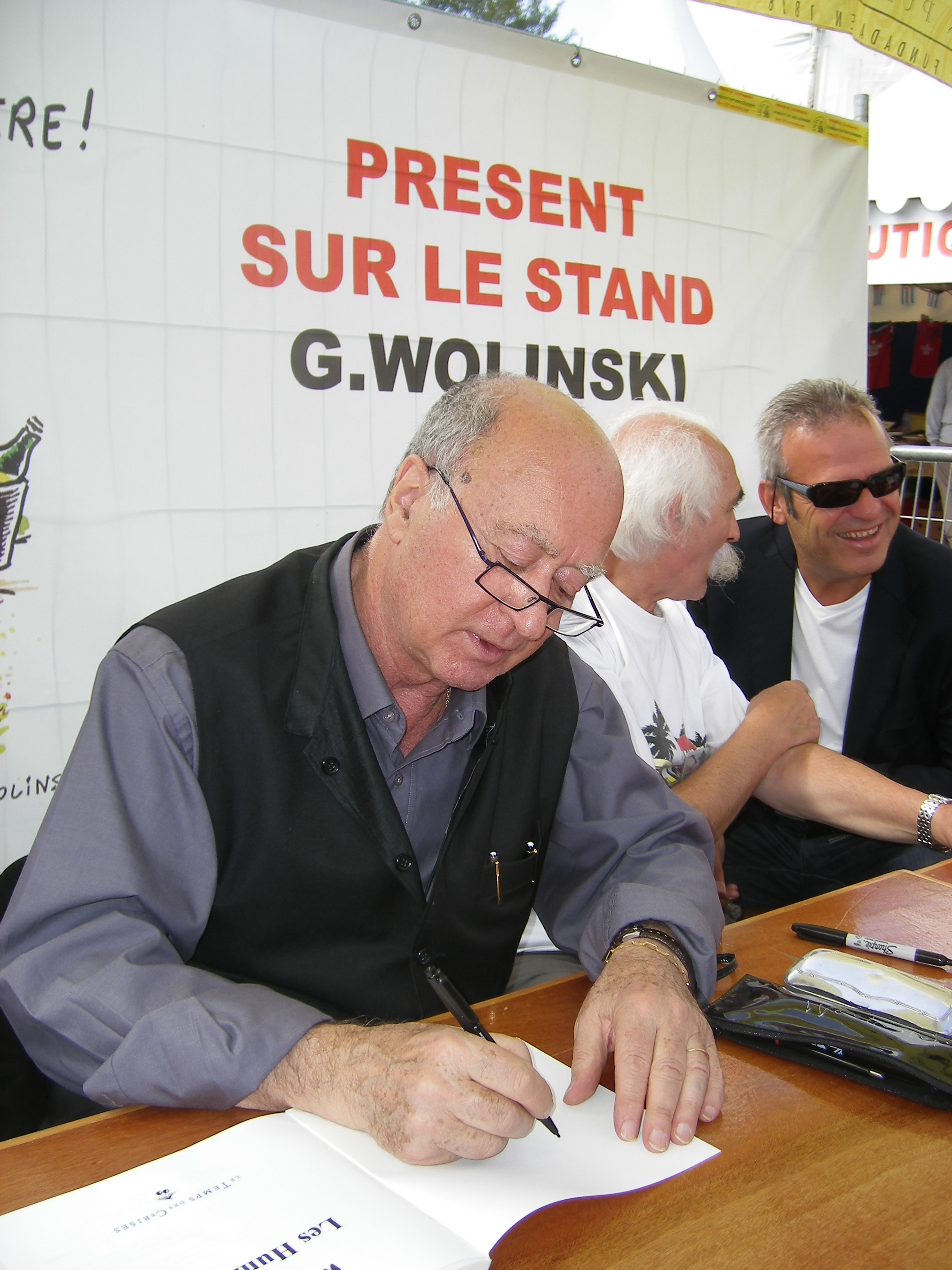 Georges Wolinski dédicaçant à la fête de l'Huma 2007.